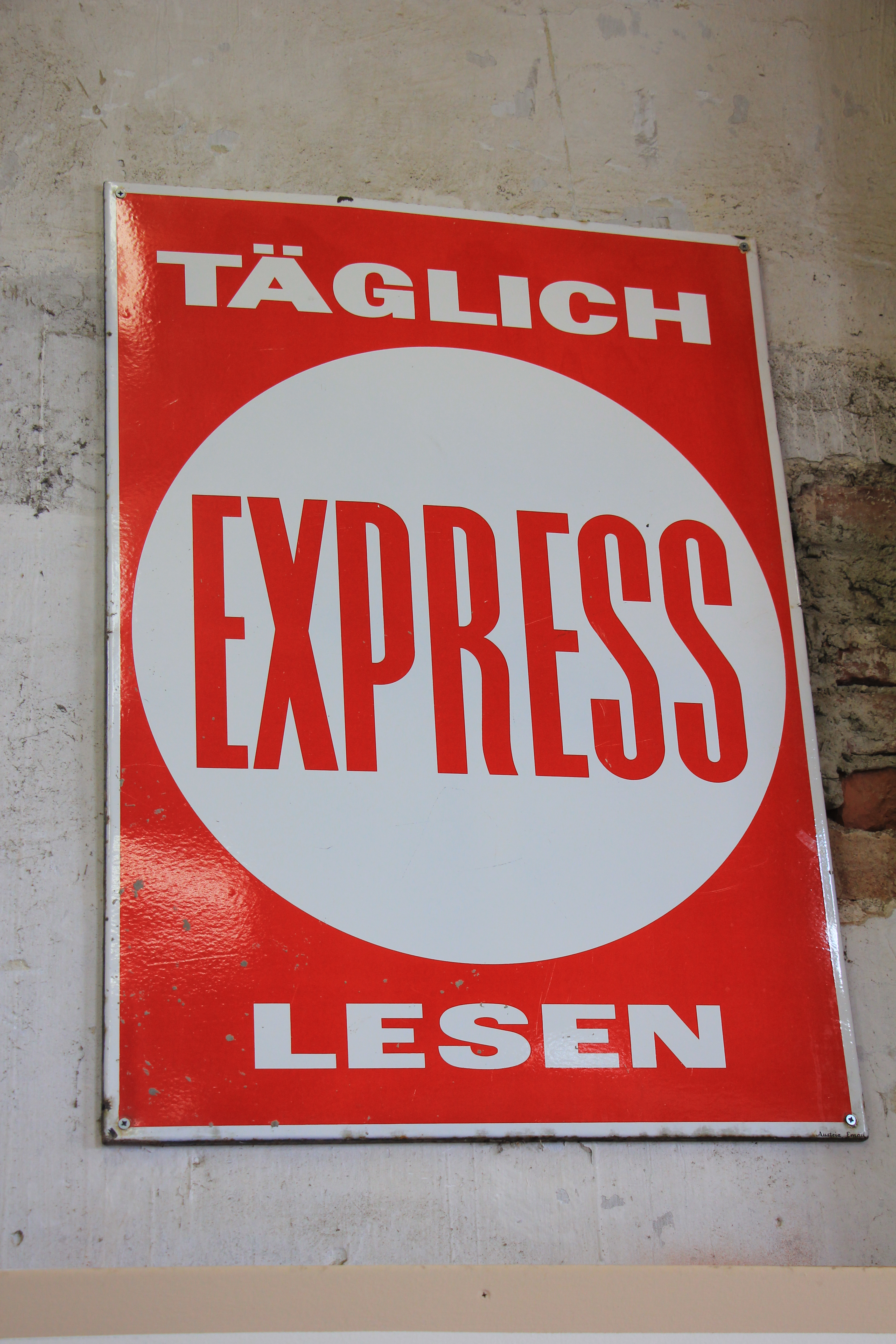 Stadtverkehrsmuseum Mödling Dieses Bild wurde anlässlich des österreichischen Tags des Denkmals 2016 in Niederösterreich eingereicht.